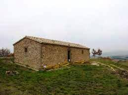 Ermita santa cecilia en garinoain